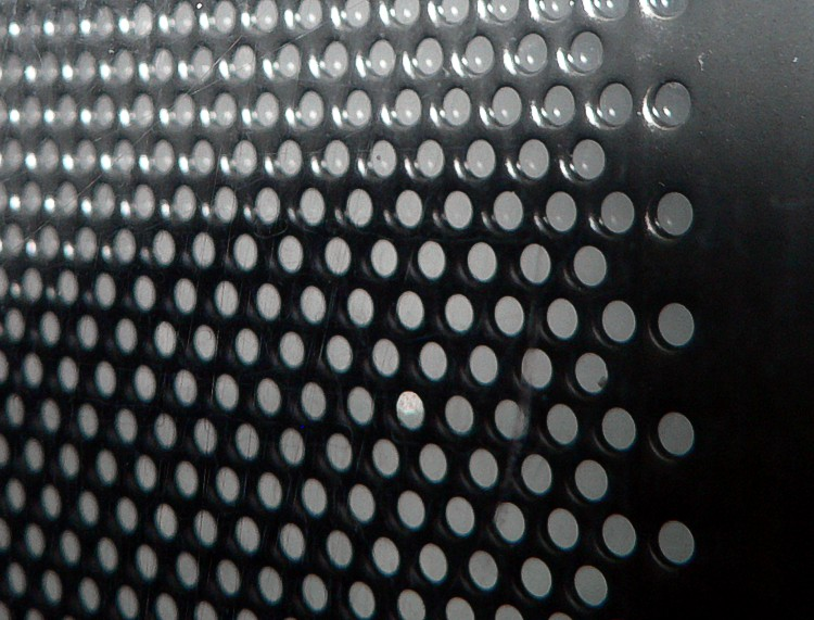 microwave oven door detail